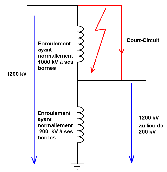 Description d'un autotransformateur en cas de court circuit